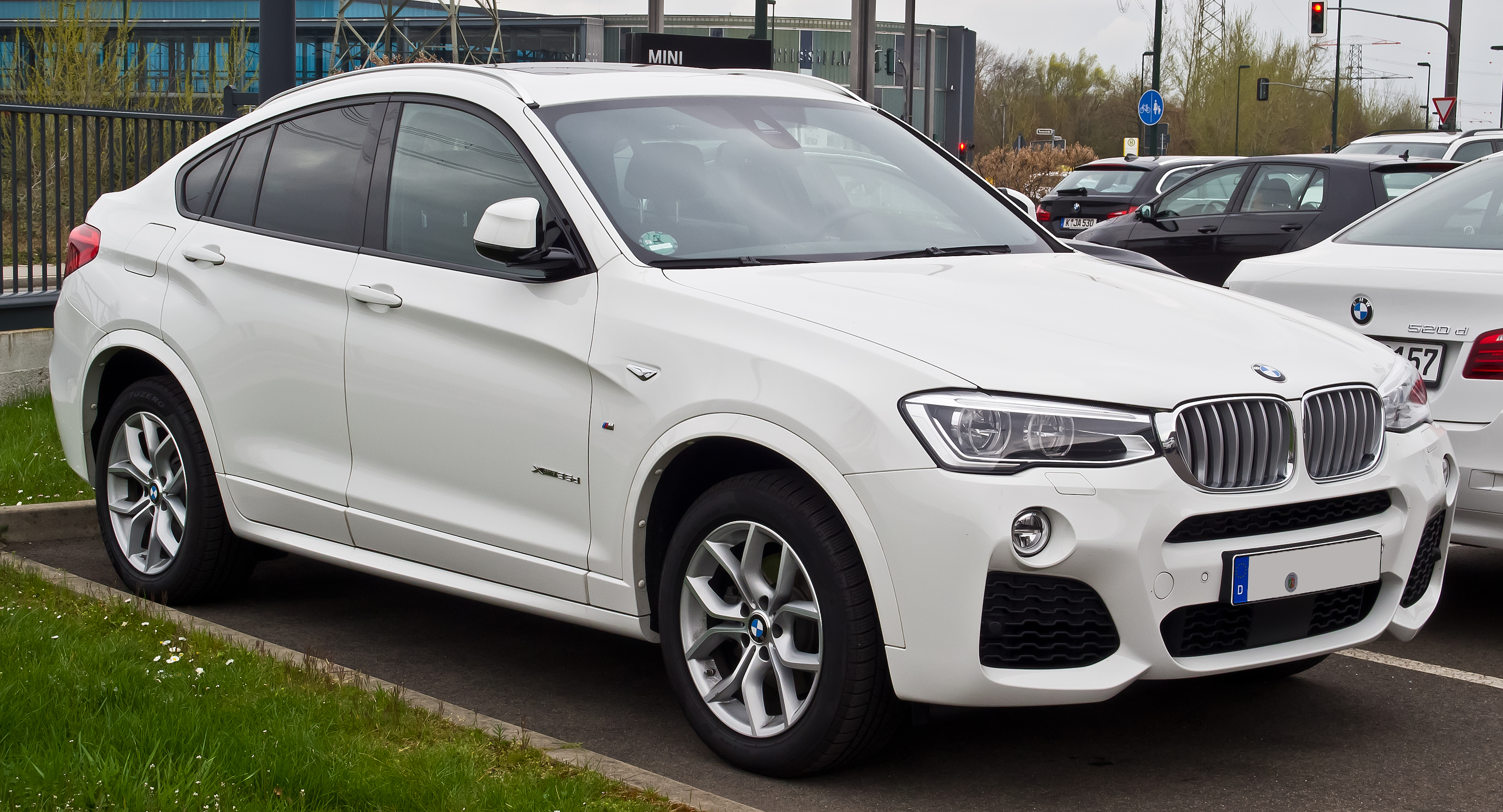 BMW X4 xDrive35d M-Sportpaket (F26)